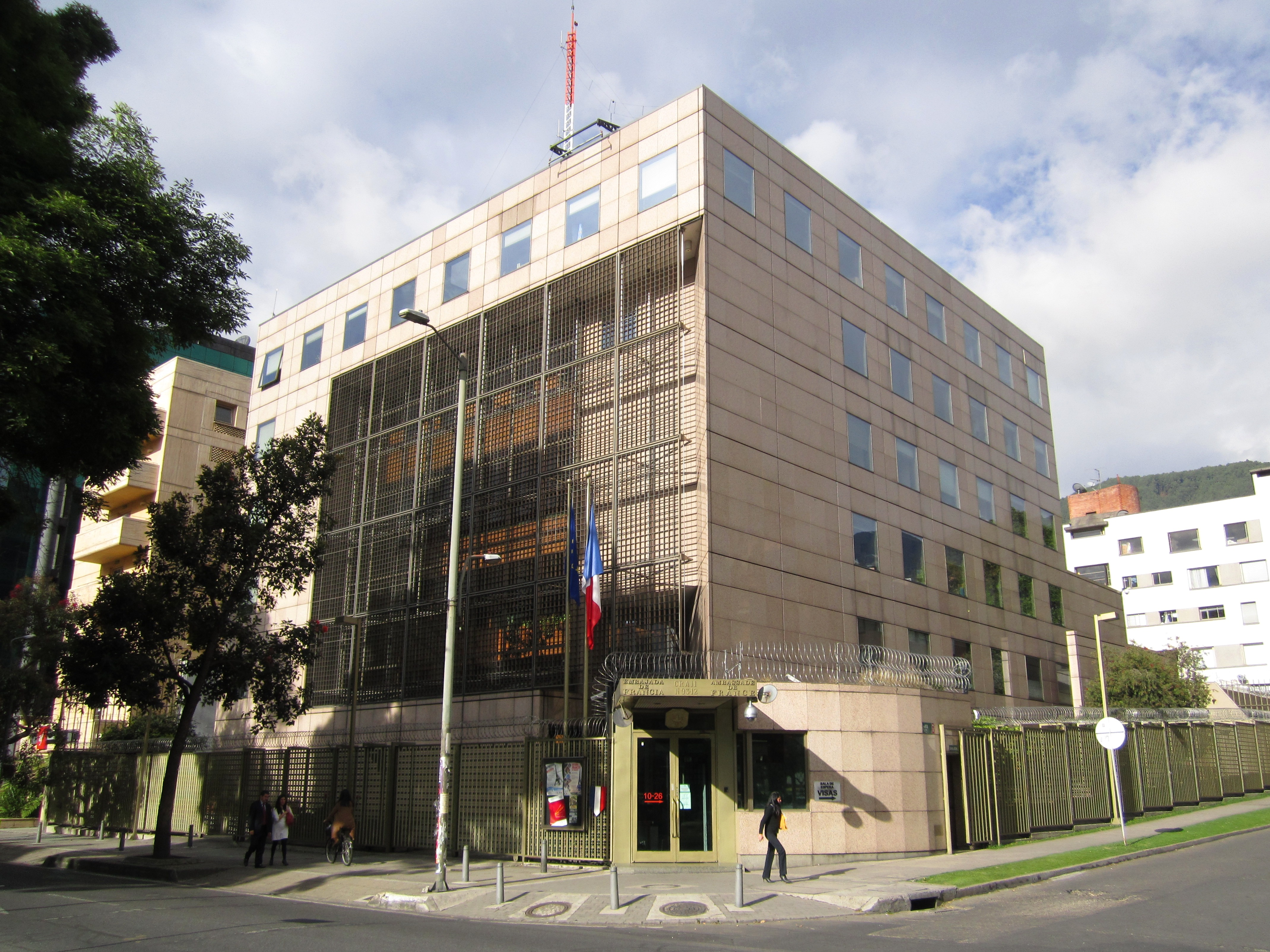 Bogotá, Embajada de Francia, carrera 11 con calle 93.